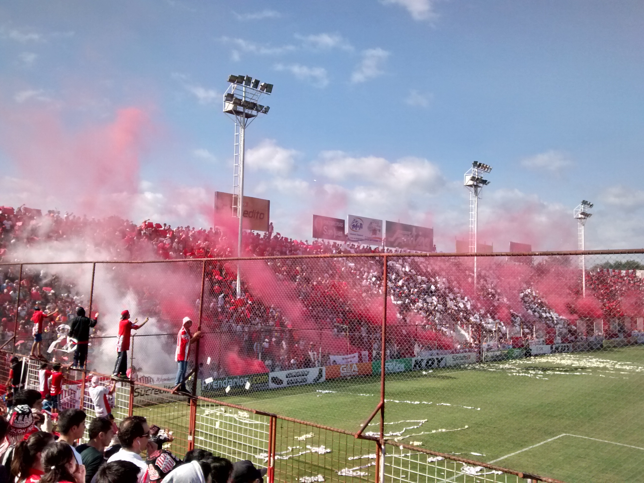 Hinchada de San Martín durante un partido del Torneo Federal A 2016